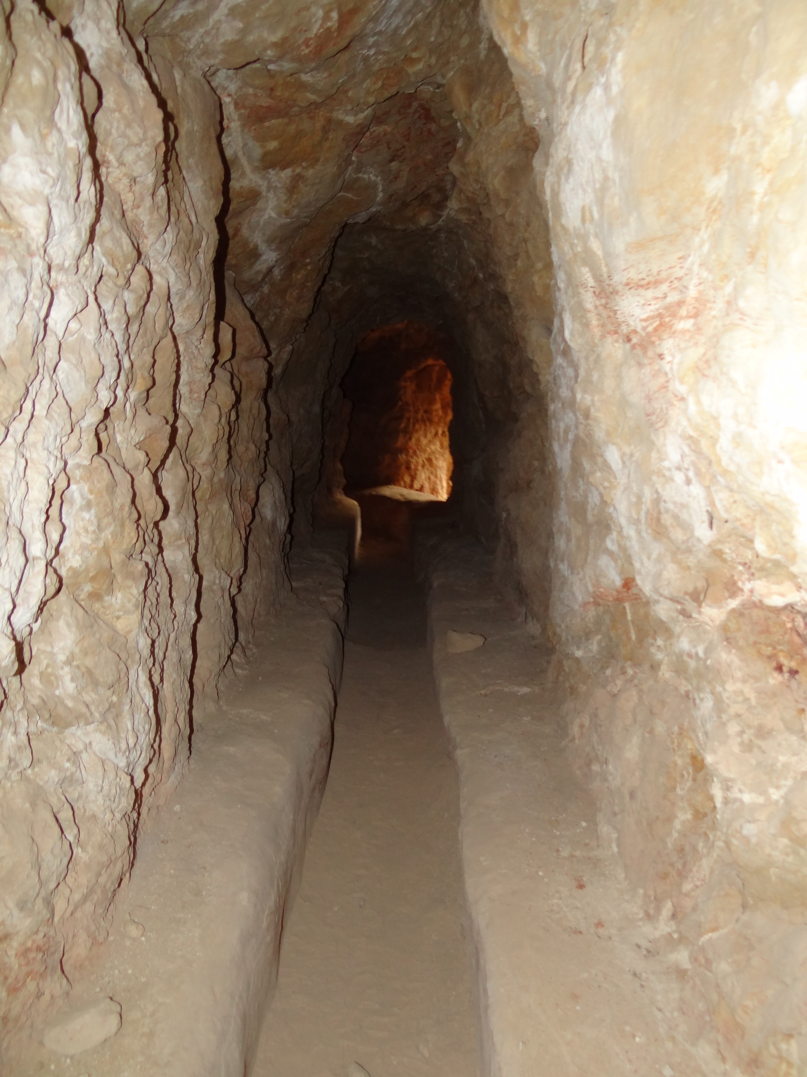 Zippori - The Ancient Water System במערכת המים העתיקה של ציפורי העיר העתיקה השוכנת בגליל מנהרת ששת הפירים, היציאה מפיר מספר 6